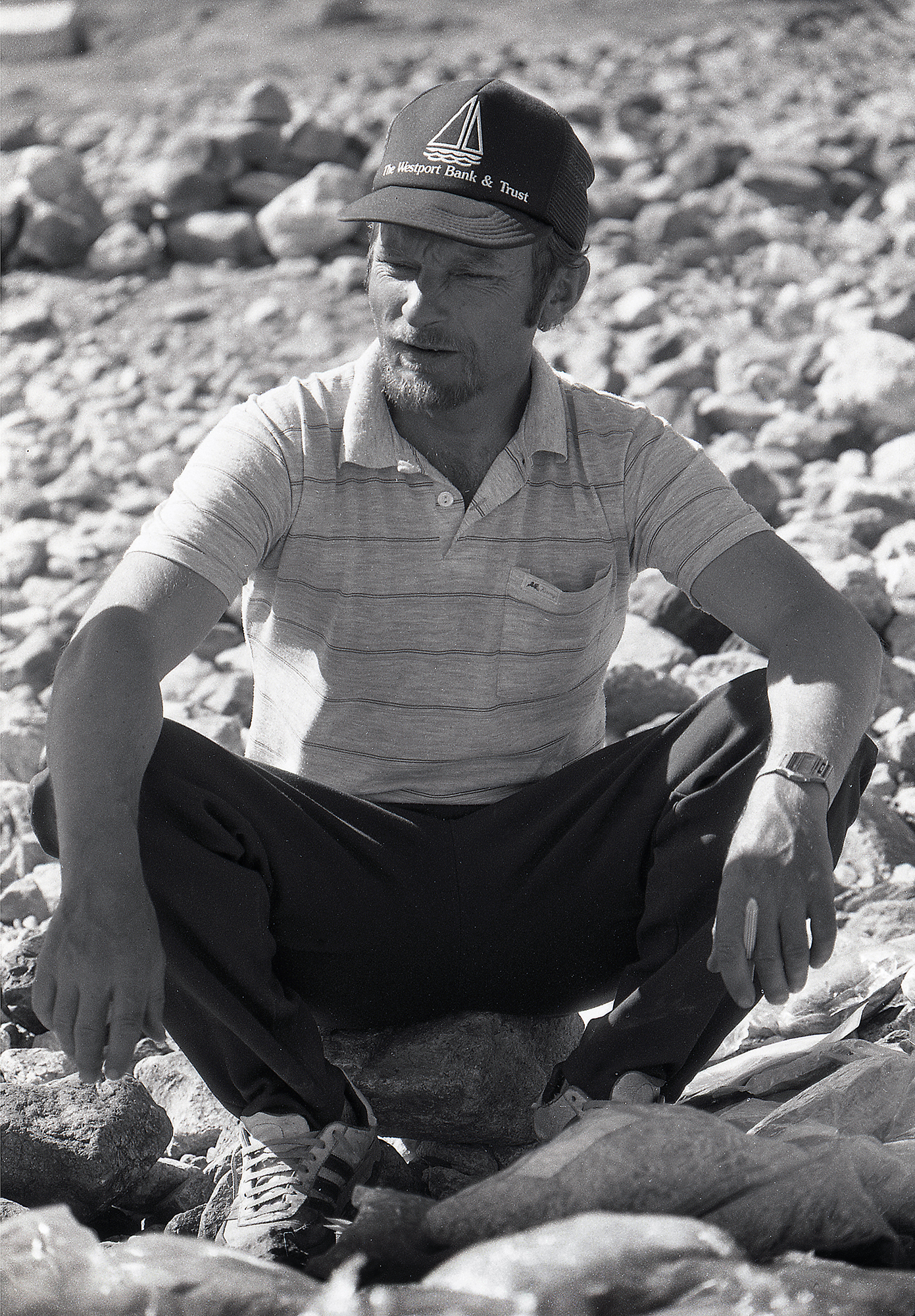 Vladimir Balyberdin, esimene Nõukogude alpinist, kes ronis Everestile.